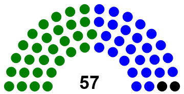 composición del Parlamento en ese periodo